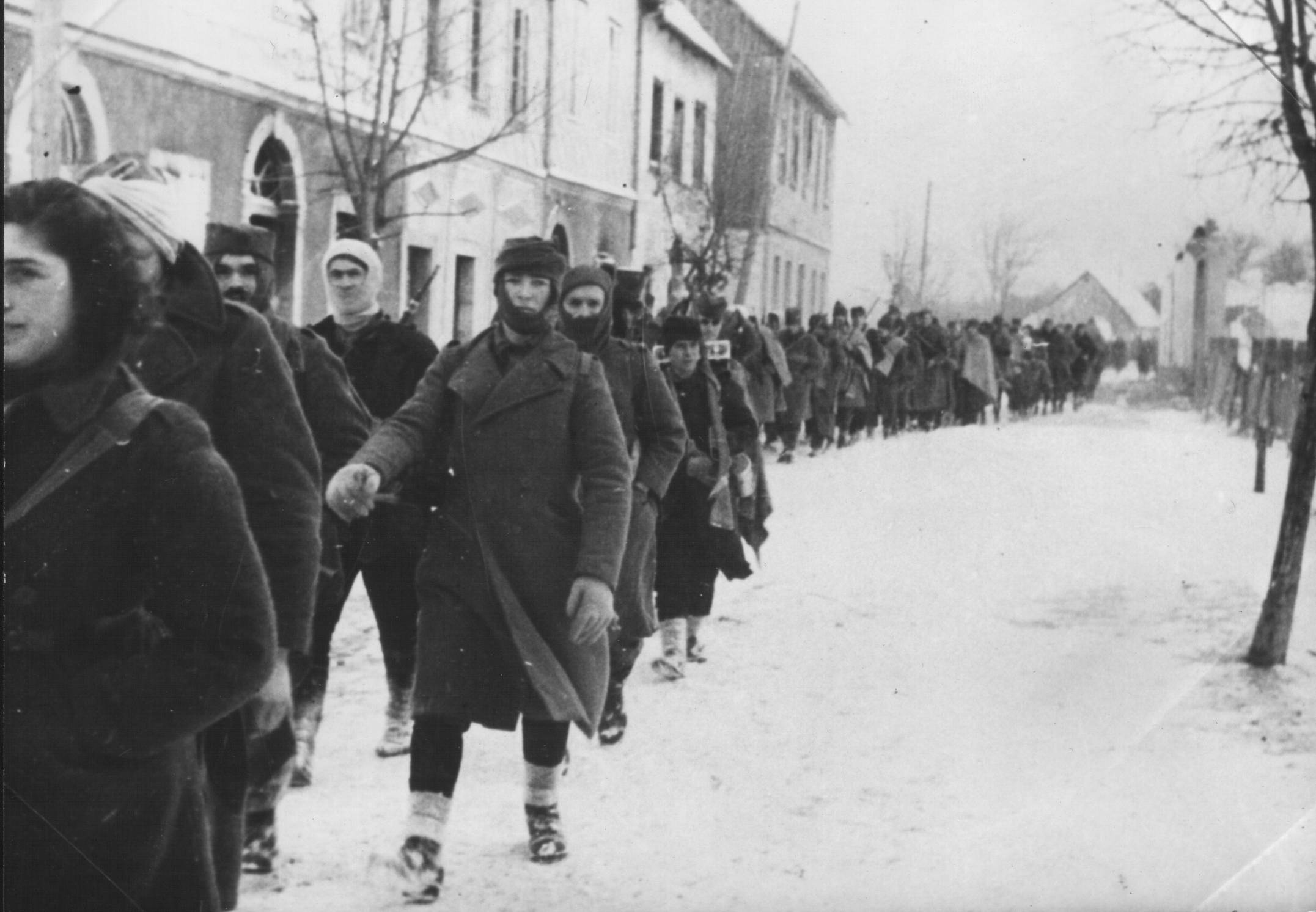 La Quinta brigata proletaria montenegrina in marcia attraverso Kolasin nel dicembre 1944